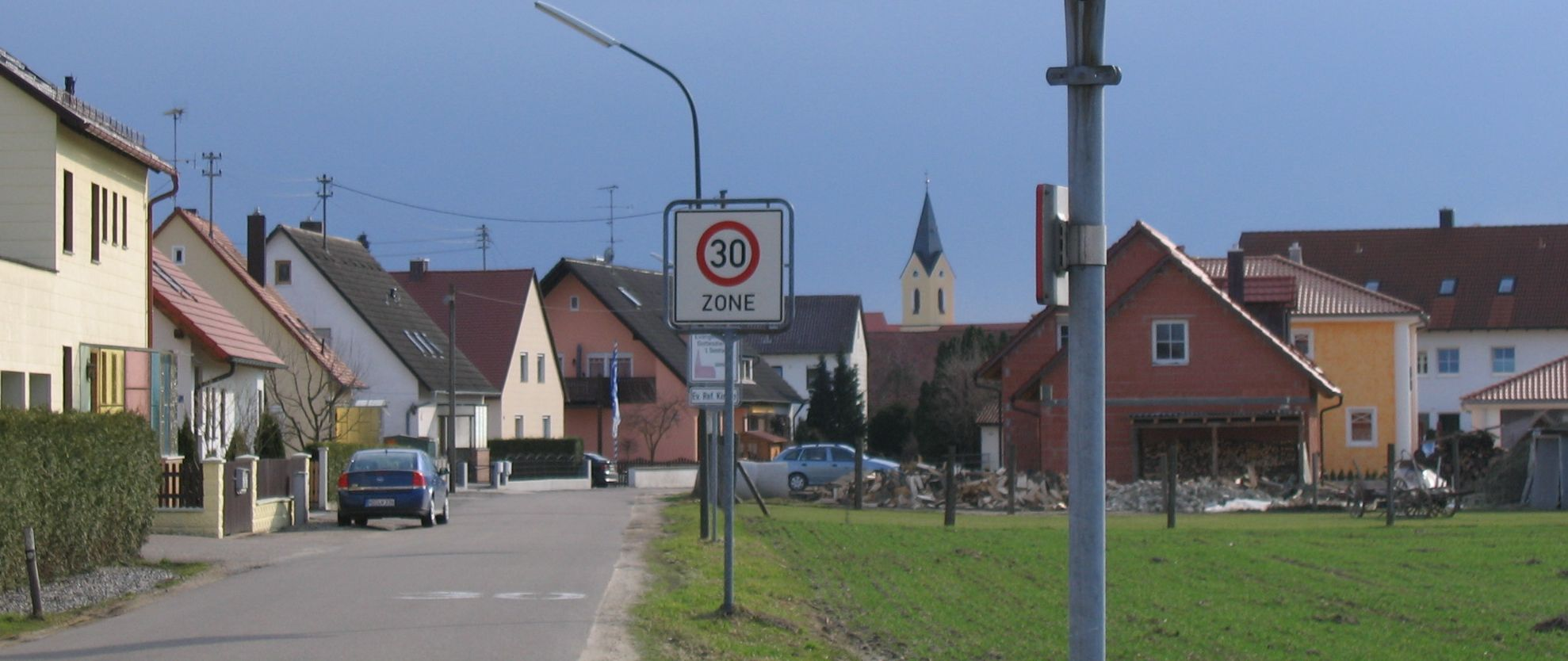 Ein Panoramablick auf Marienheim.